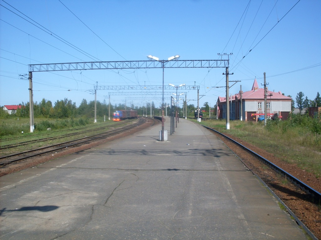 Вид в сторону Санкт-Петербурга